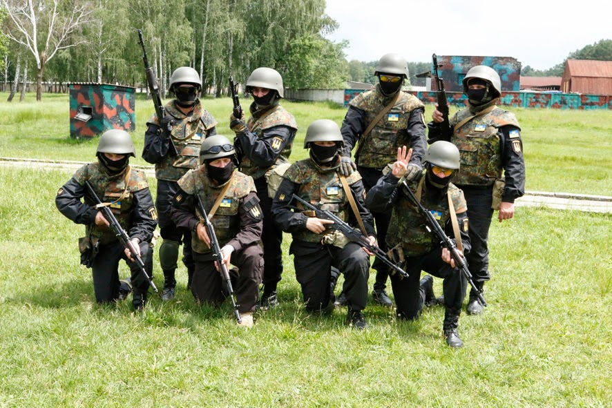 Відкрите тренування добровольців батальйону Донбас на тренувальній базі Нацгвардії України під Києвом.